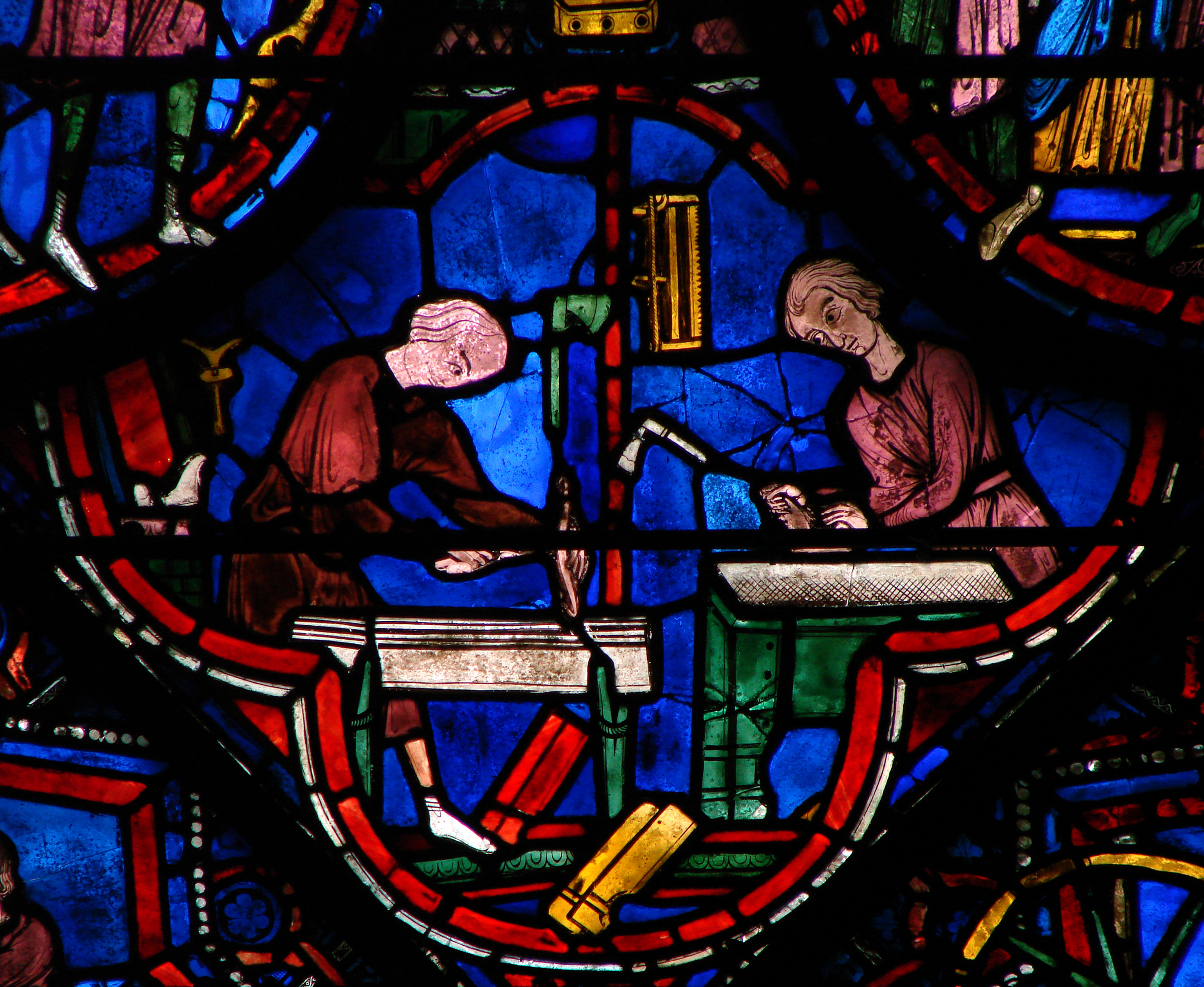 Détail d'un vitrail de la cathédrale Notre-Dame de Chartres.